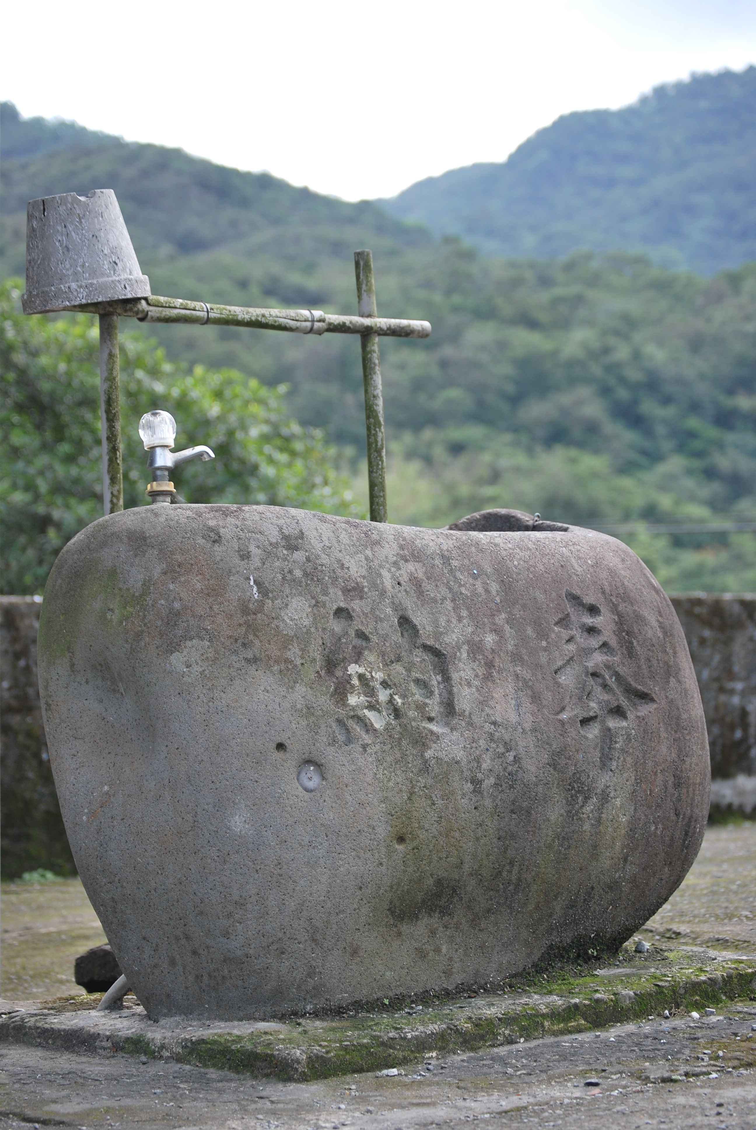 中文（台灣）: 崁腳國小手水舍水盤